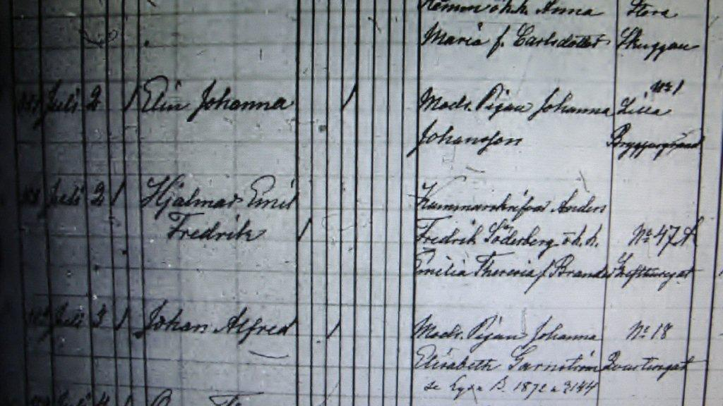 Uppslag ur födelseboken: H j a l m a r Emil Fredrik (son av A n d e r s Fredrik och E m i l i a Theresia Brander), född den 2 juli 1869 i Hedvig Eleonora församling, Stockholm. Adress: Gref Thuregatan 47 A.